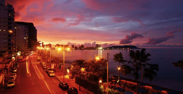 Salinas al caer el sol